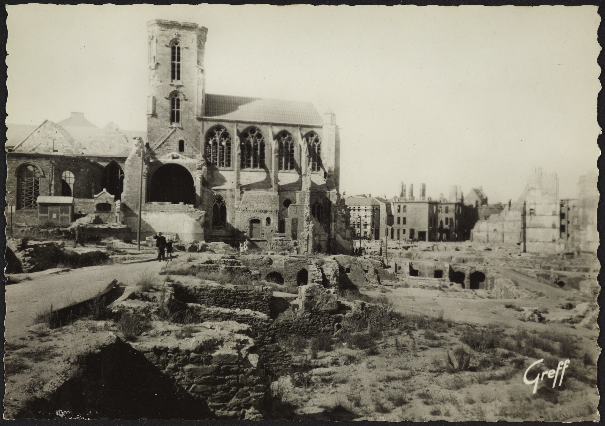 Saint-Malo en ruines suite au bombardement allié de 1944 , carte postale édition du Greff (Paris), collection du Musée de Bretagne.